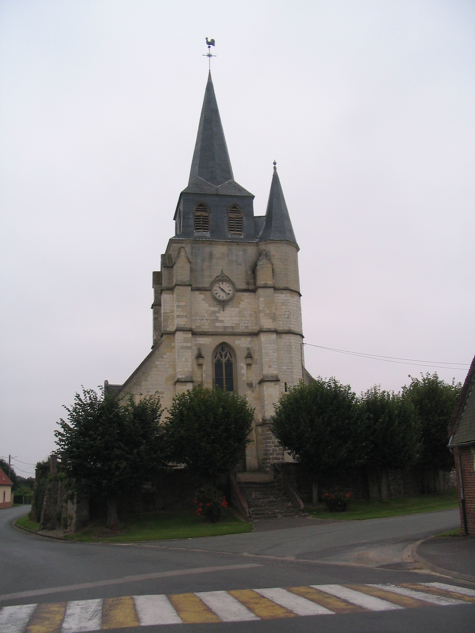 Eglise Saint-Denis de Gannes (Oise).